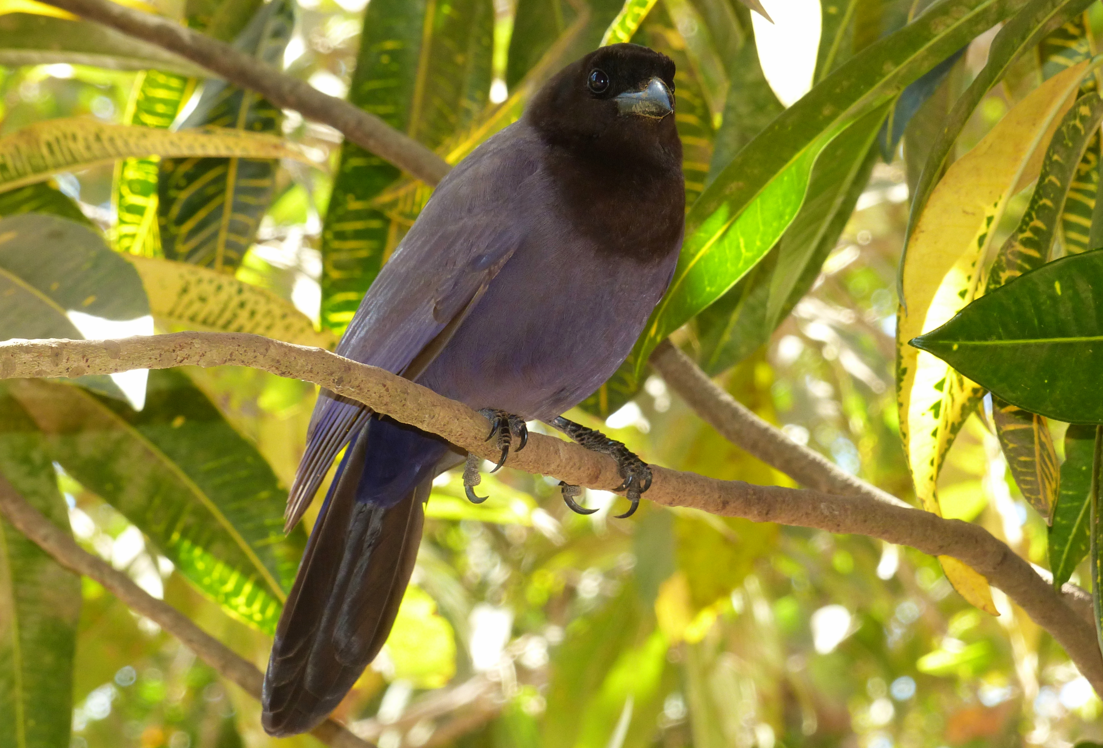 Barara, Transpantaneira, Poconé, Mato Grosso, BRAZIL